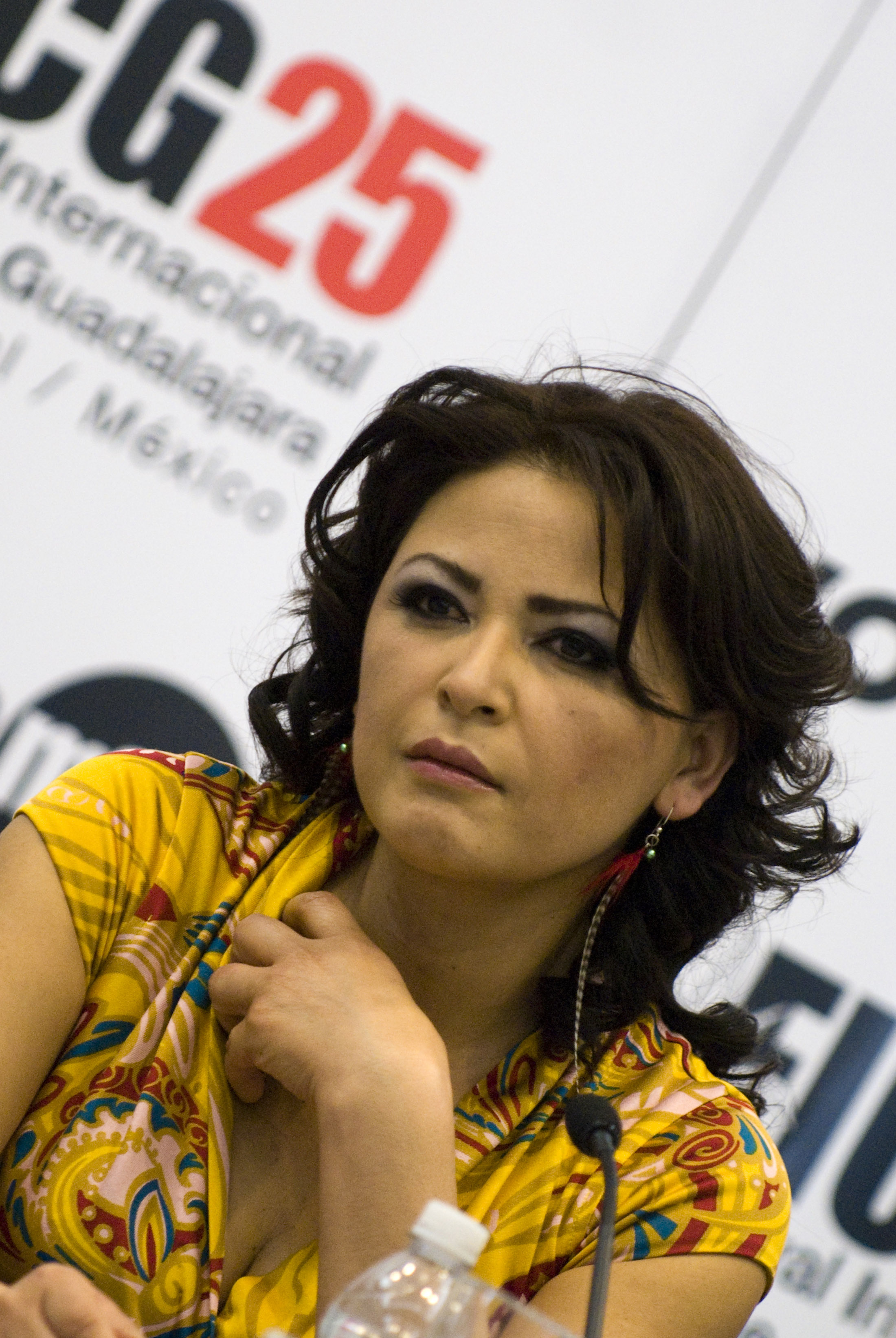 Conferencia de prensa de Rodrigo García (centro), acompañado por la actriz Elpidia Carrillo (derecha) y Enrique Blanc (izquierda) como presentador, dentro de las actividades del Festival Internacional de Cine de Guadalajara en su edición 25. 17 de Marzo, 2010. Guadalajara, México. © Cortesía FICG25 / Michel Amado Carpio.